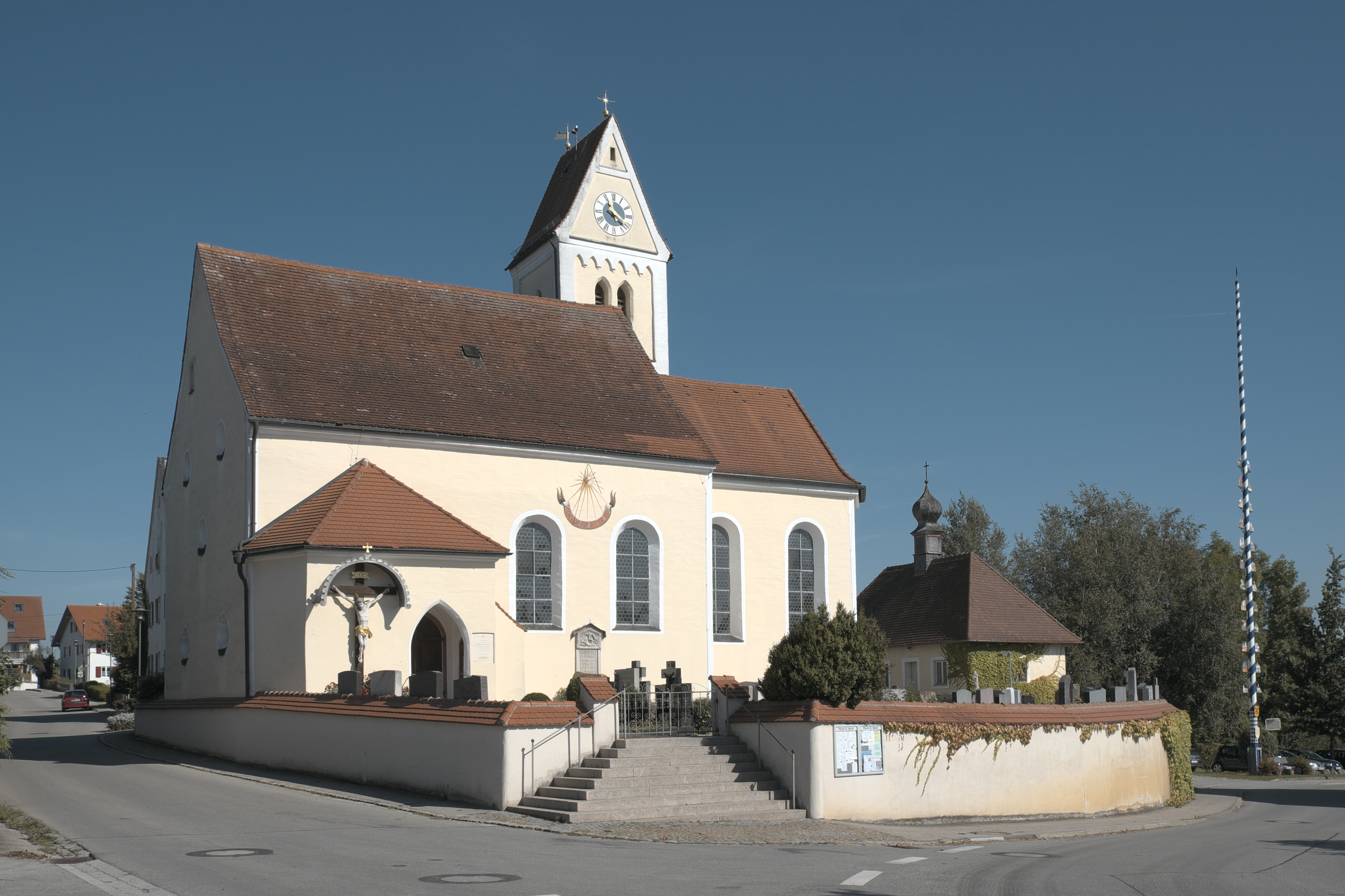 Katholische Pfarrkirche St. Martin in Penzing im Landkreis Landsberg am Lech (Bayern/Deutschland)